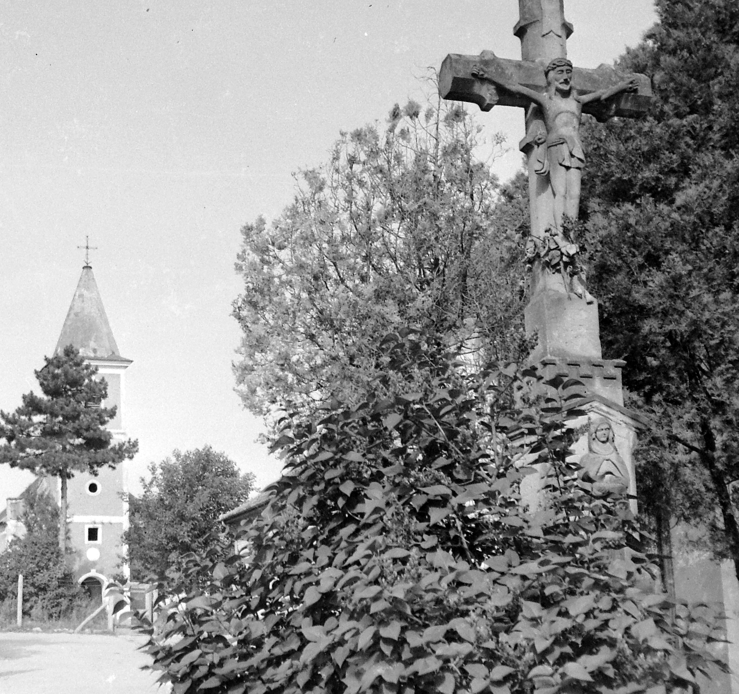 Szent István király-templom. Location: Hungary, Balatonszepezd Tags: crucifix, cross, church Title: Szent István király-templom.